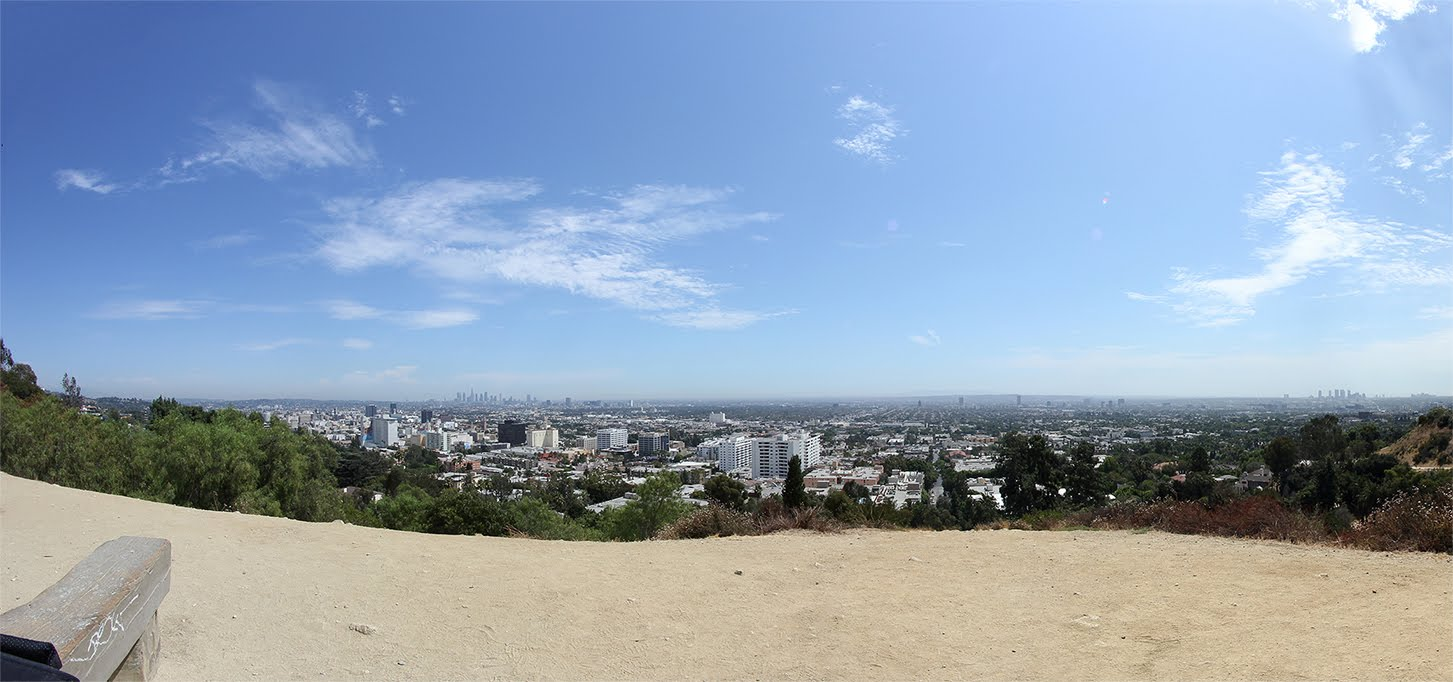 Ausblick auf Los Angeles vom Inspiration Point, Runyon Canyon